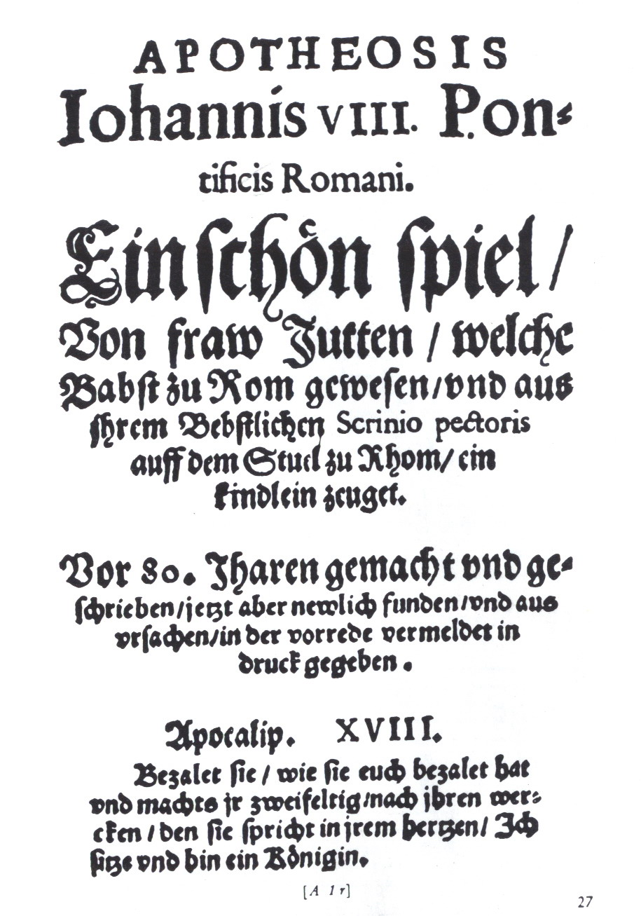 Ein schön spiel / von fraw Jutten / welche Babst zu Rom gewesen